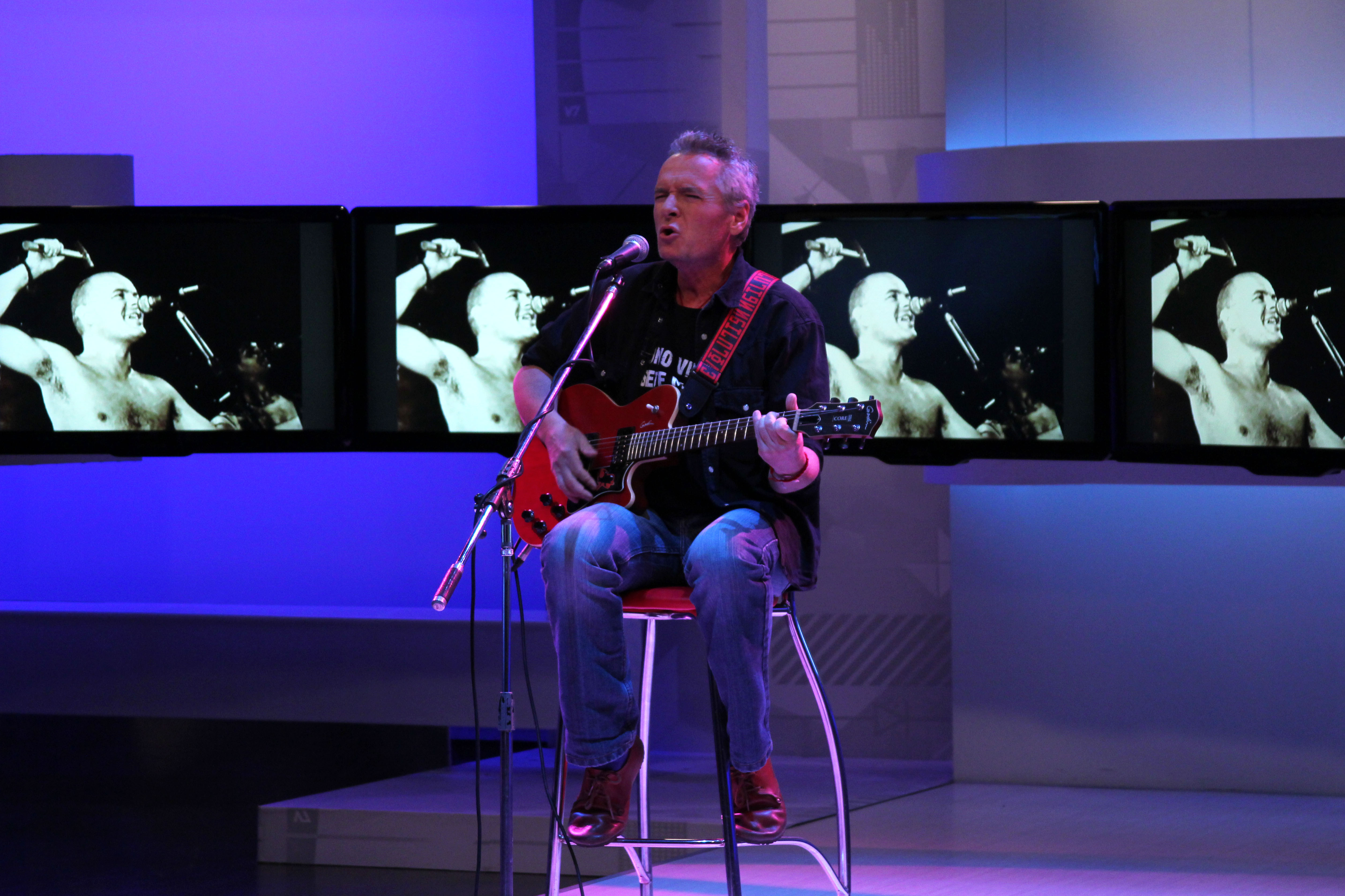 Andrea Prodan dando un concierto en la señal de TV Pública.